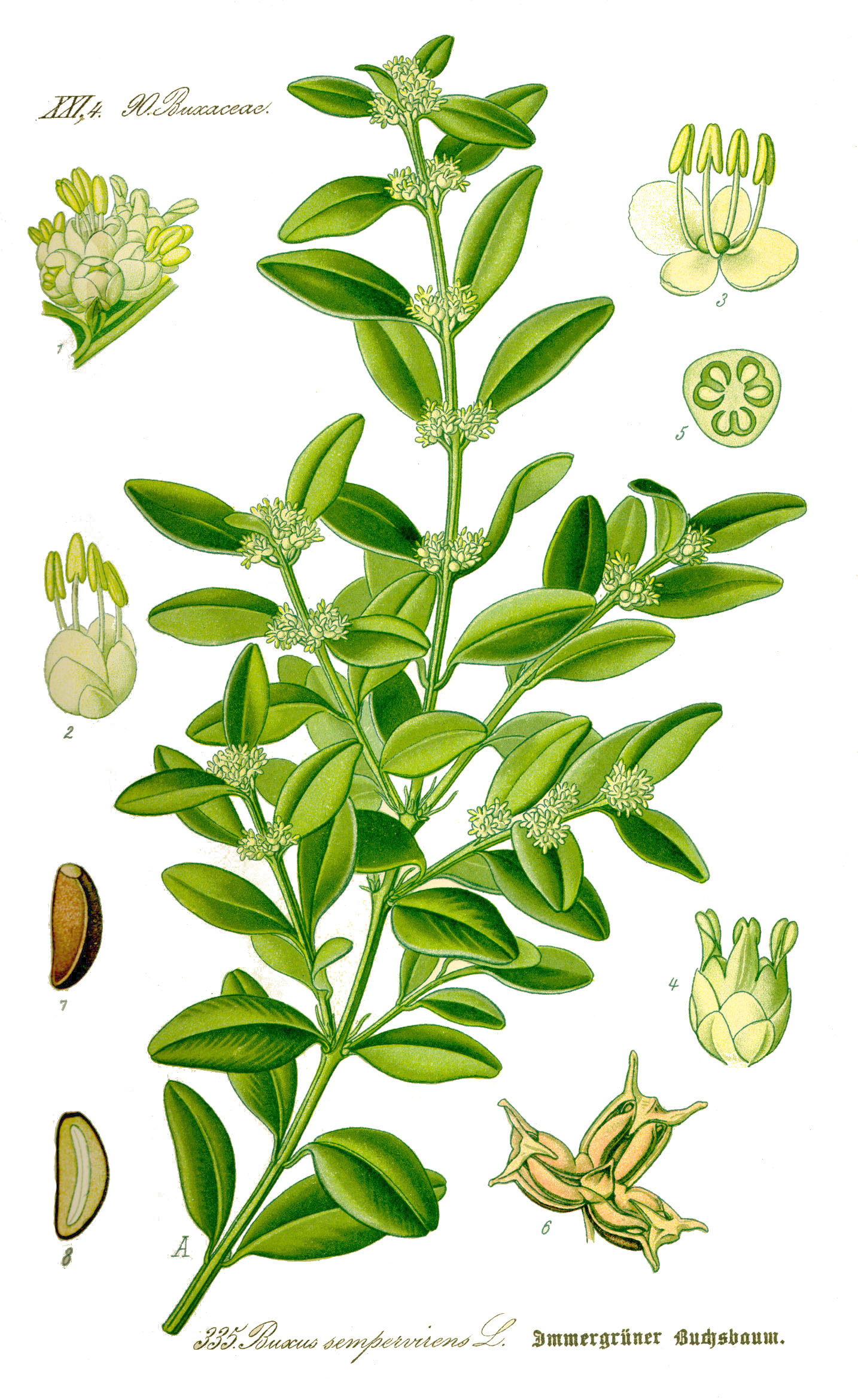 Buxus sempervirens